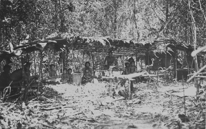 foto. Kubu bevolking in een hut in het bos in de Boven-Tebo-streken in de residentie Djambi